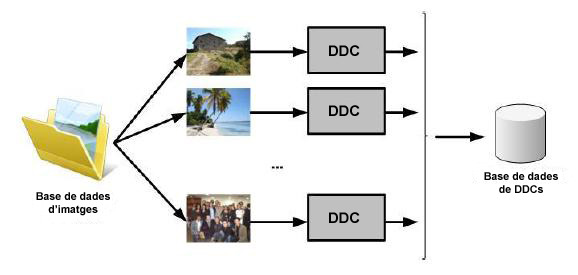 Esquema de desenvolupament d'una aplicació per tal de buscar coincidencies entre imatges mitjançant els seus DDC (Descriptors de la Distribució del Color)